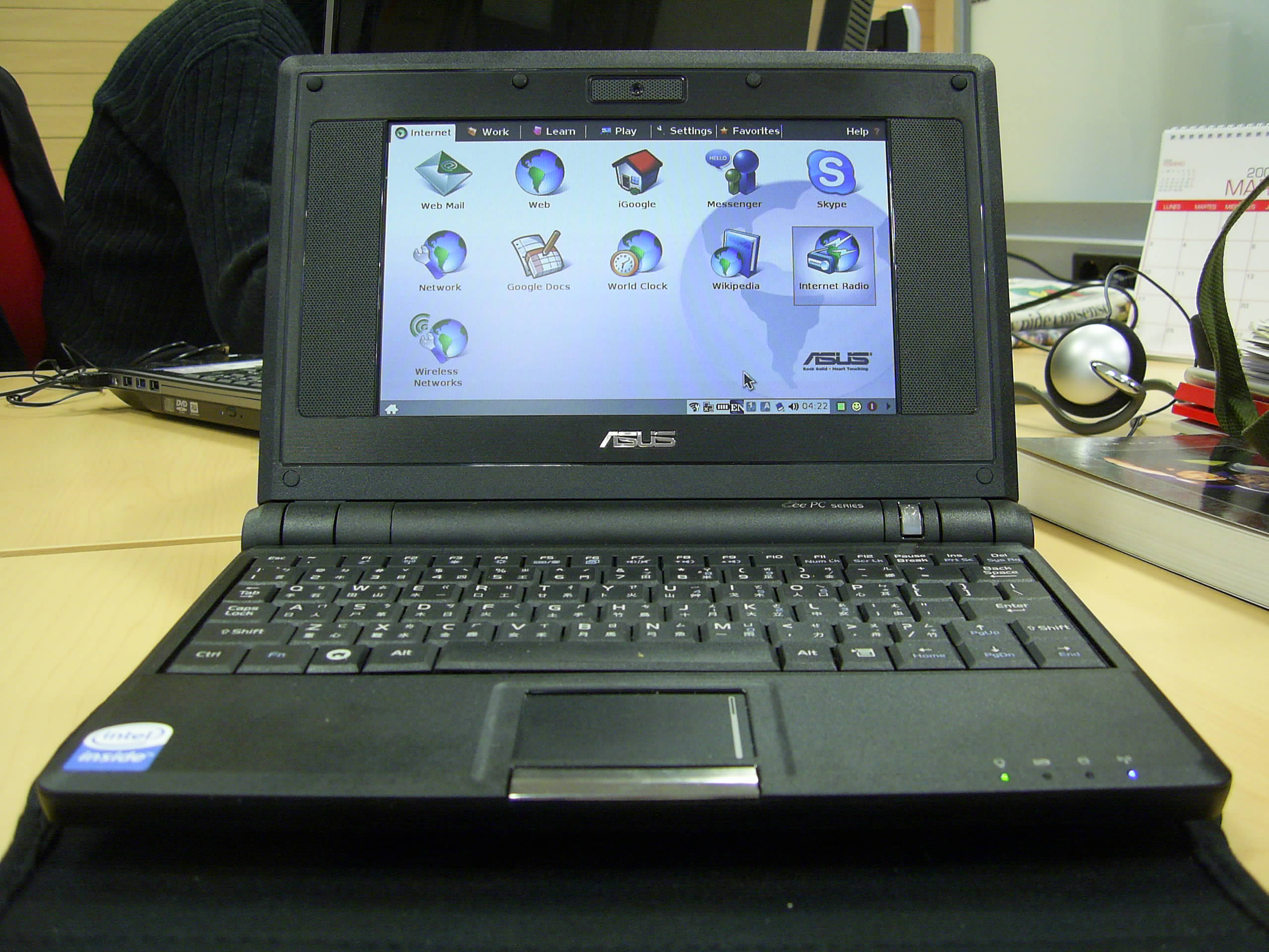 ASUS Eee PC con interfaz por tabs